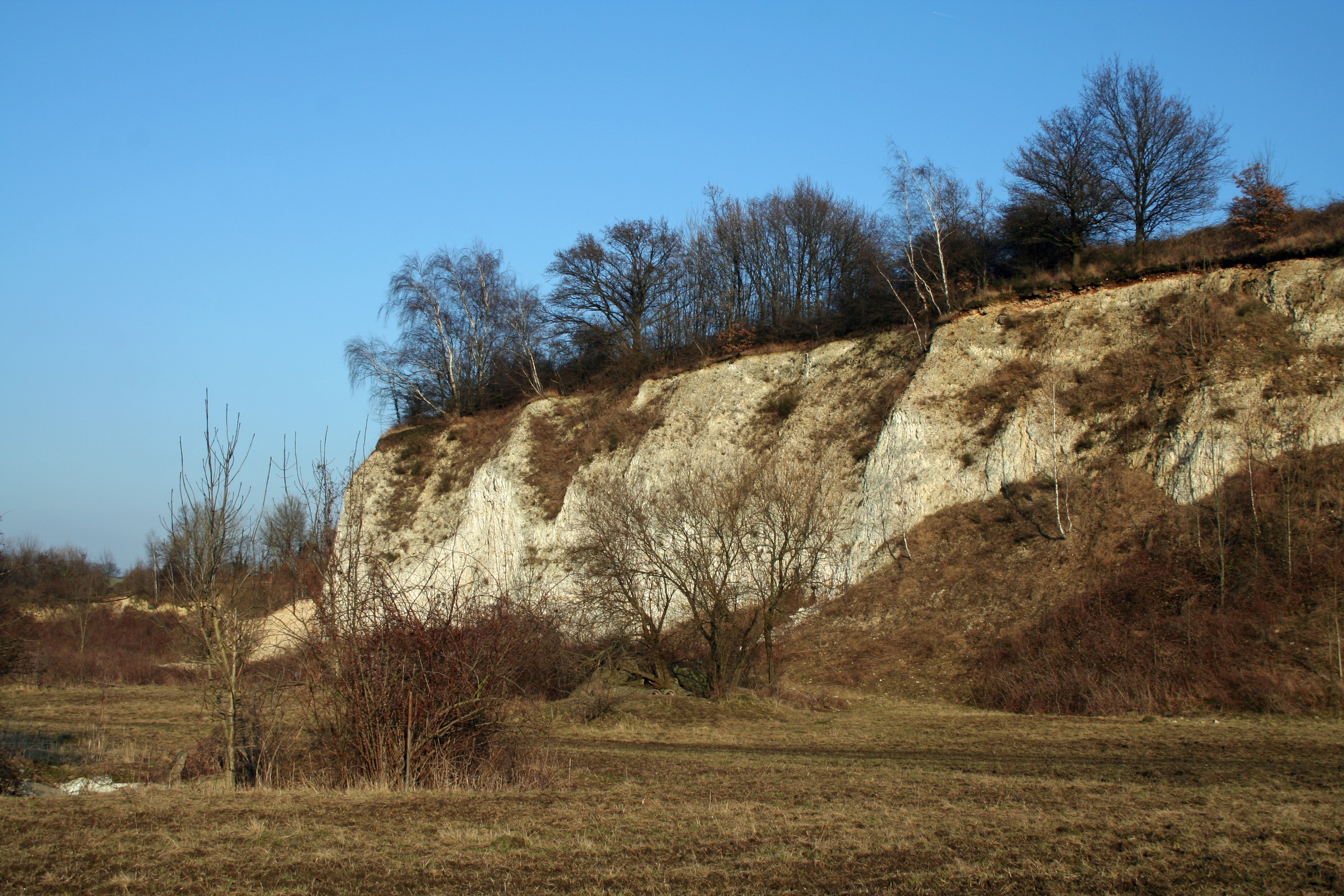 Ancien site d'extraction de craie.